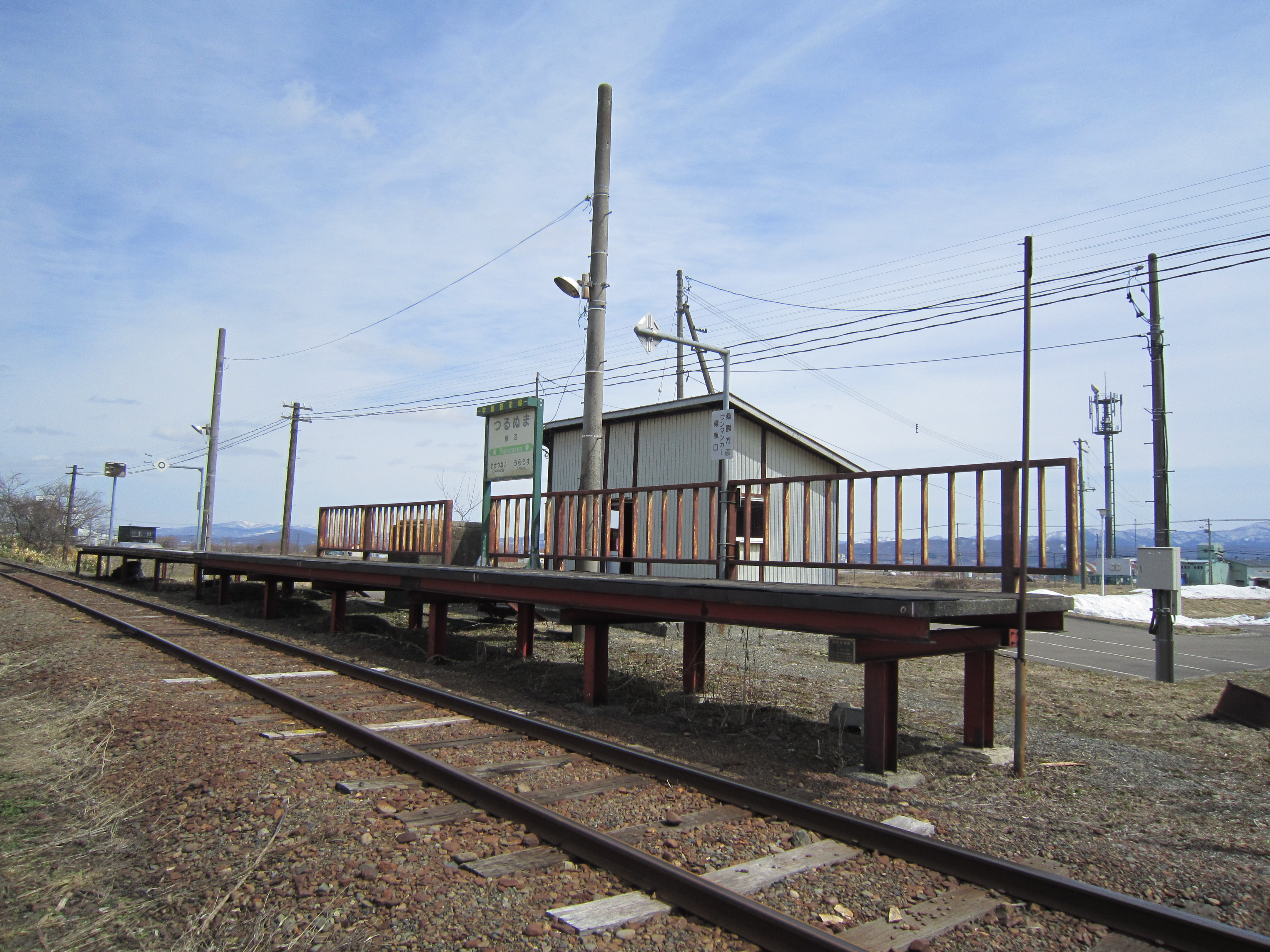 鶴沼駅。浦臼町